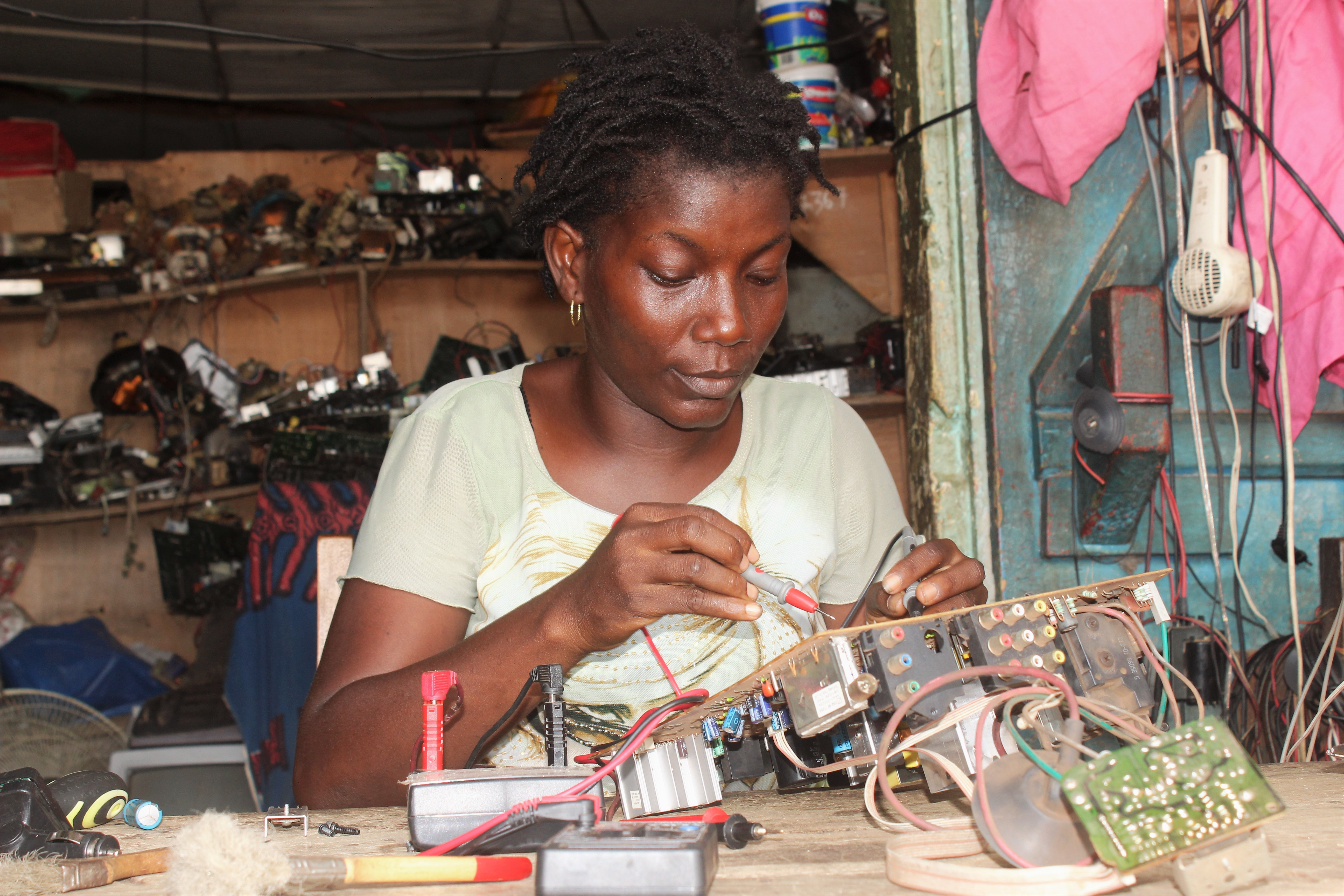 une réparatrice de télévision en plein travail dans son atelier à Dabou, en Côte d'Ivoire This is an image of "African people at work" from Ivory Coast